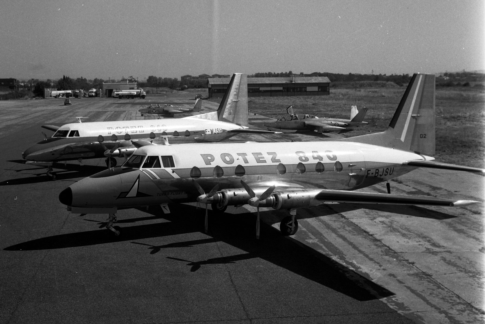 Pistes de Blagnac. 24 septembre 1962. Vue d'ensemble en plongée de l'avion Potez 840 stationné sur le tarmac (vue de côté). Cliché pris avant son départ pour les Etats-Unis.